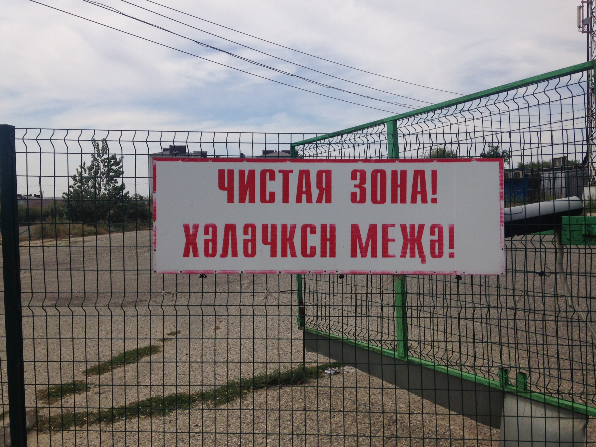 Надпись на калмыцком языке на автовокзале Элисты